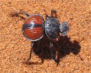 Onymacris ??, Dünenkäfer, Sossusvlei, Namibia IDENTIFICATION: Pachysoma denticolle Péringuey, 1888 [det. S.E. Thorpe, 2012]